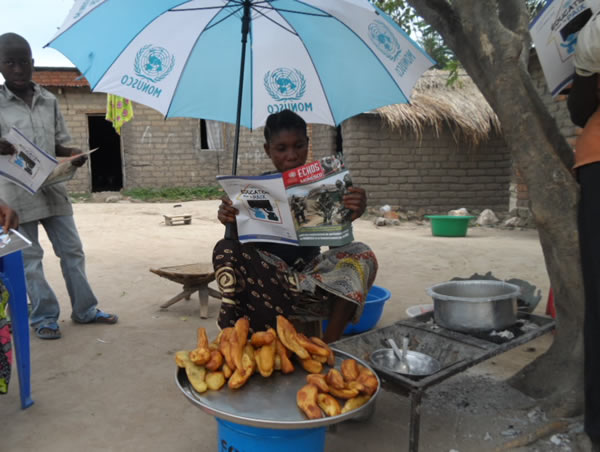 LEGENDE : Une vendeuse de patates douces à Baraka Mwambangu à 93 KM d'Uvira au Sud-Kivu prend plaisir à lire « Les Echos de la MONUSCO » dans son lieu de travail. Pour se prémunir contre le soleil et la chaleur, elle s'est abritée sous un parasoleil offert par la MONUSCO. Photos: MONUSCO/Jean-Tobie OKALA CAPTION : Sweet potatoes saleswoman in Baraka Mwambangu, 93 Km away from Uvira, South-Kivu reading with great relish “Echos de la MONUSCO” at her working place; sheltered under MONUSCO-donated sunshade to protect herself from the sun and heat. Photos: MONUSCO/Jean-Tobie OKALA